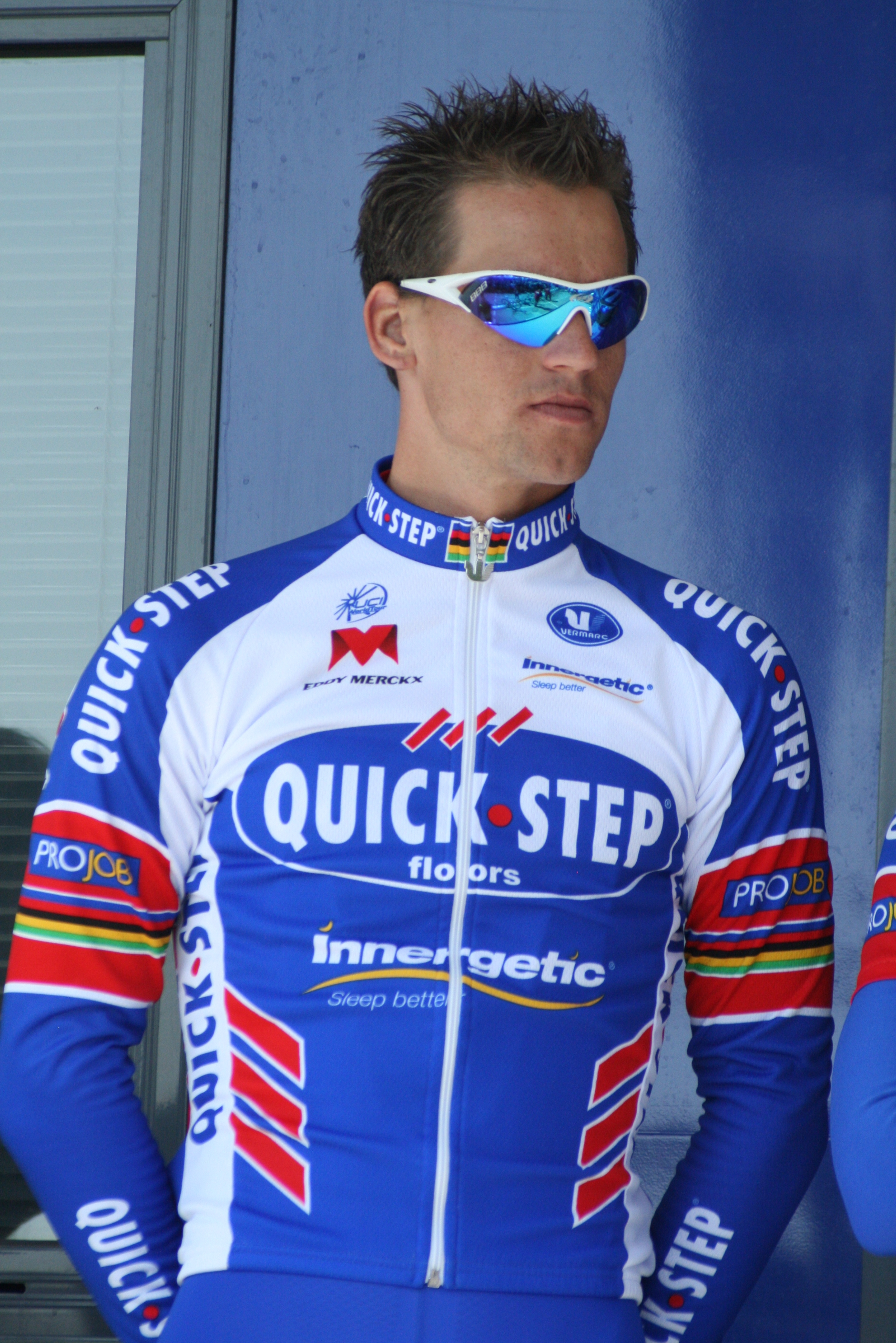 Présentation des coureurs au départ de la première étape Zdeněk Štybar